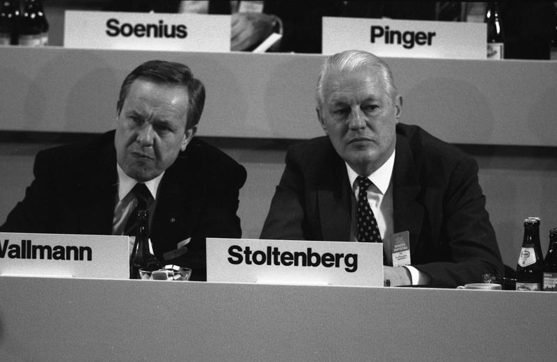 9.11.1987 35. Bundesparteitag der CDU in der Beethovenhalle, Bonn.